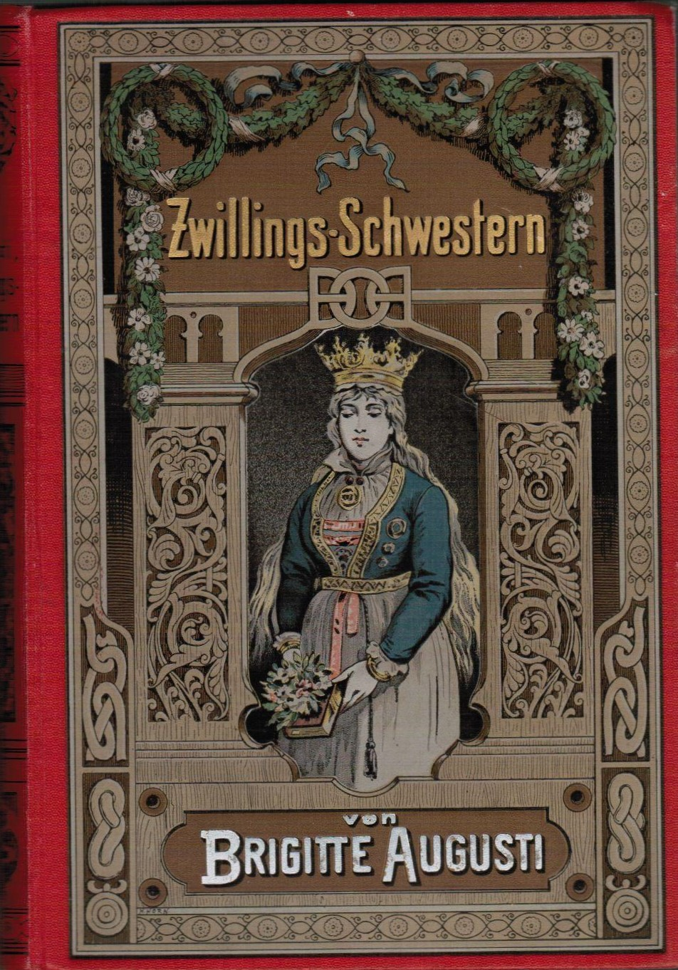 Brigitte Augusti (d.i. Auguste Plehn) : Zwillings-Schwestern. Erlebnisse zweier deutschen Mädchen in Skandinavien und England. Für das reifere Mädchenalter, Ferdinand Hirt, Breslau, 1891 Mit vielen, z.T. ganzseitigen Abb. v. Prof. Woldemar Friedrich